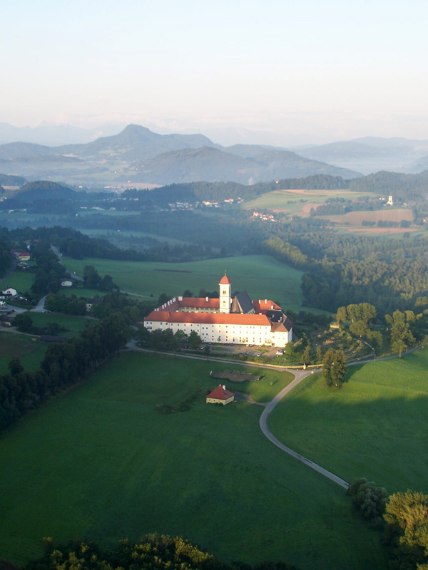 Sankt Georgen am Längsee